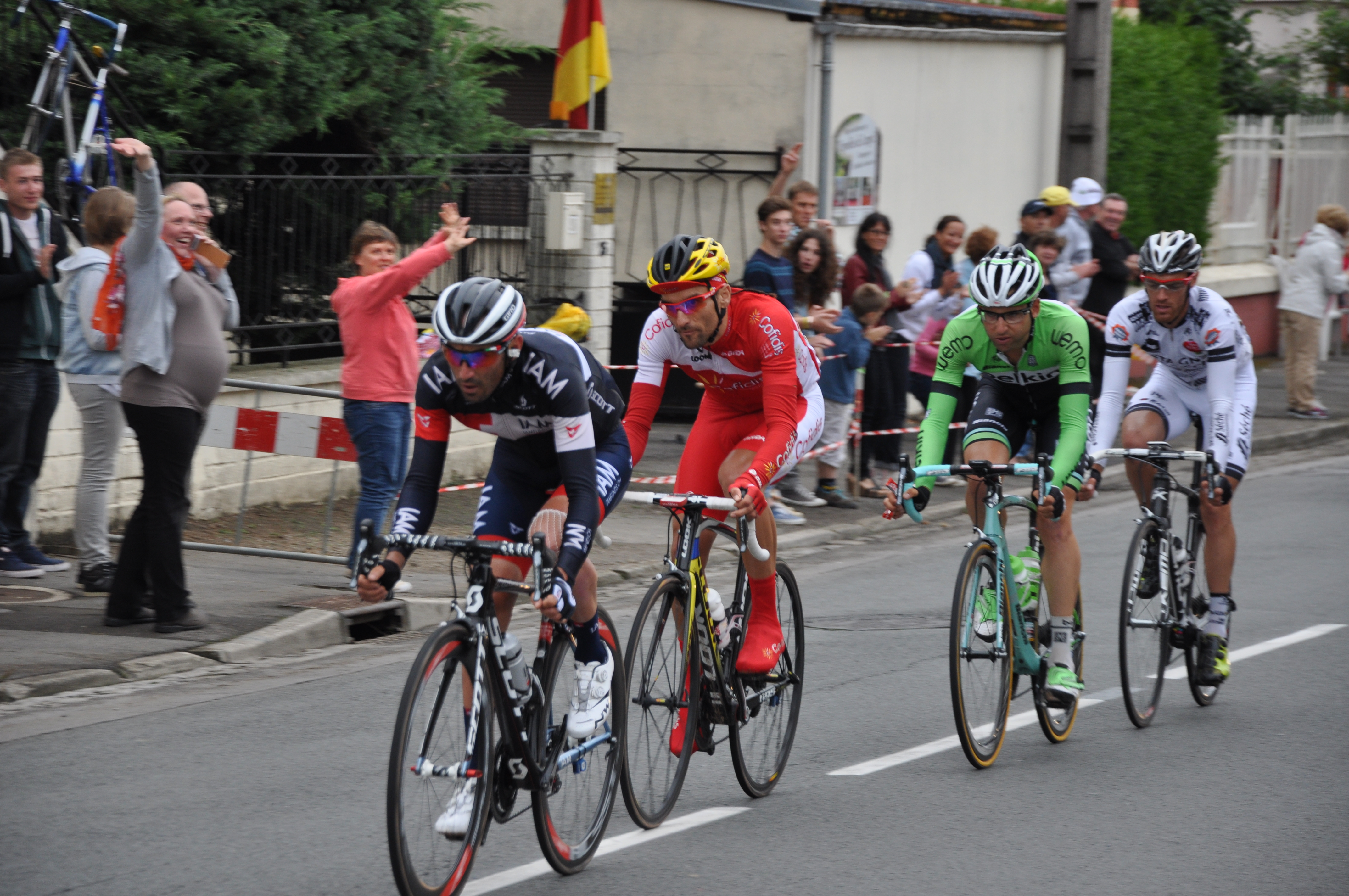 Echappée TDF2014 Etape 6 Tergnier